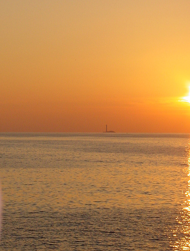 Phare de Planier vu de la côte